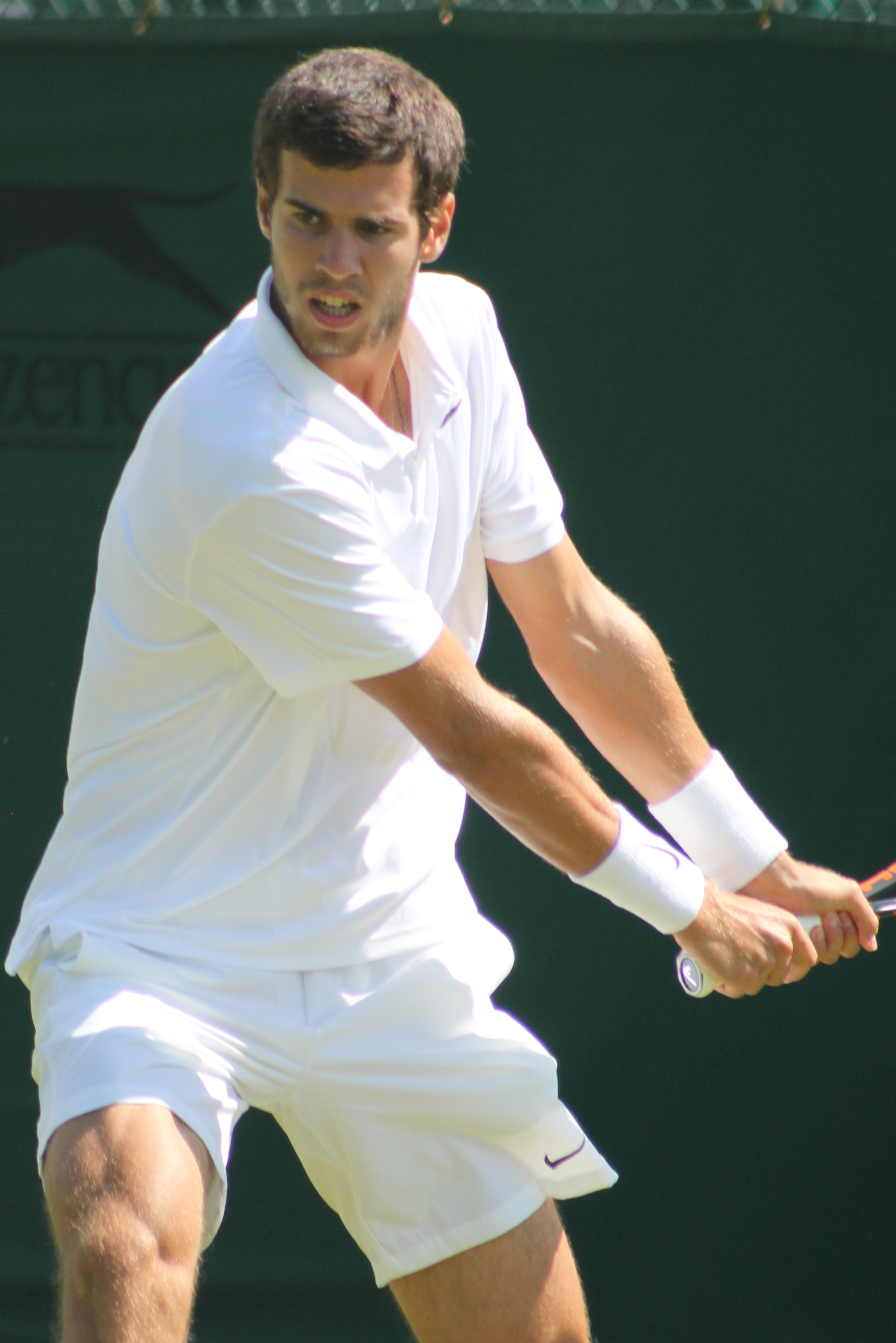 Khachanov WMQ15 (11)